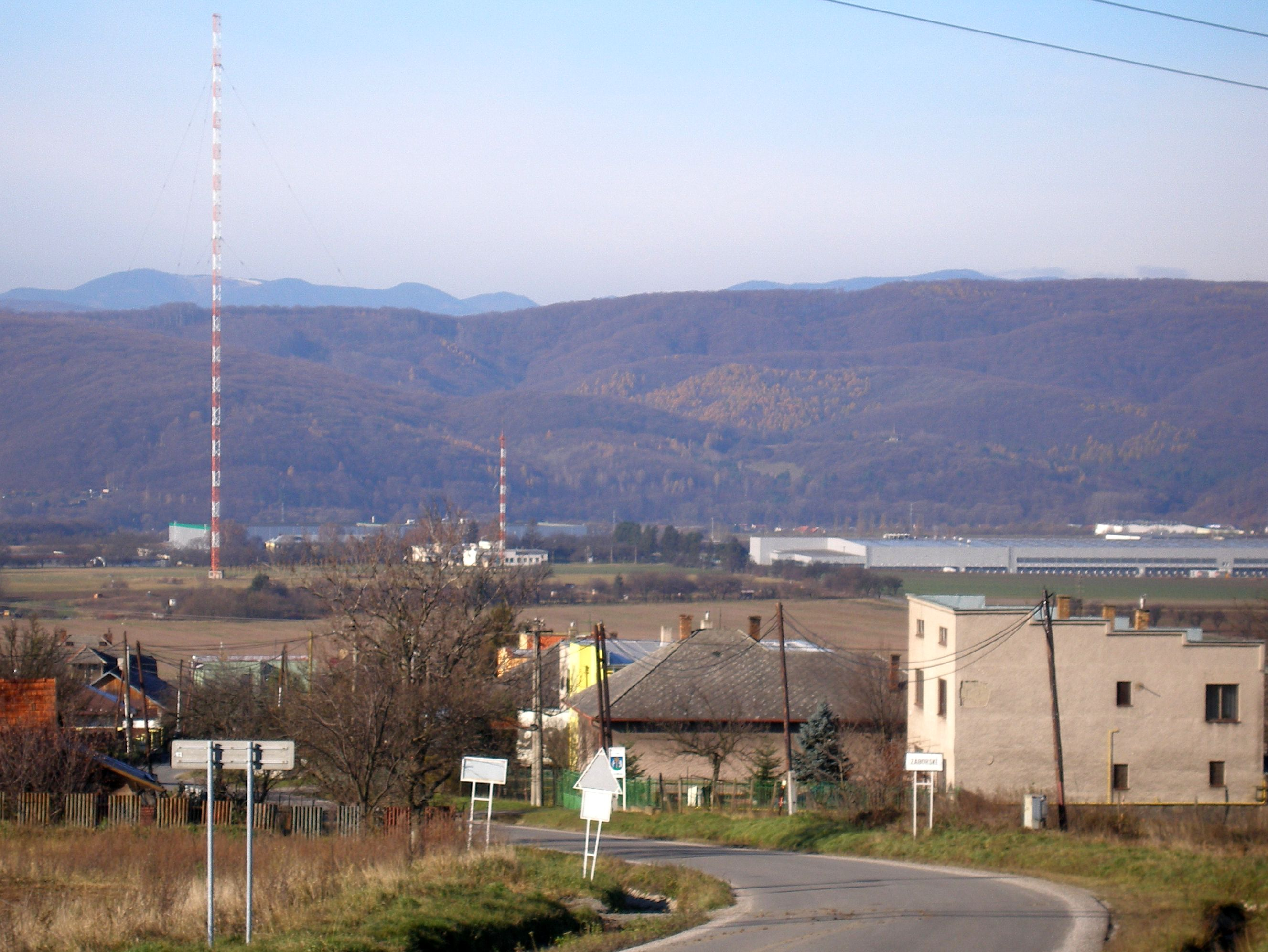 Obec Záborské v okrese Prešov